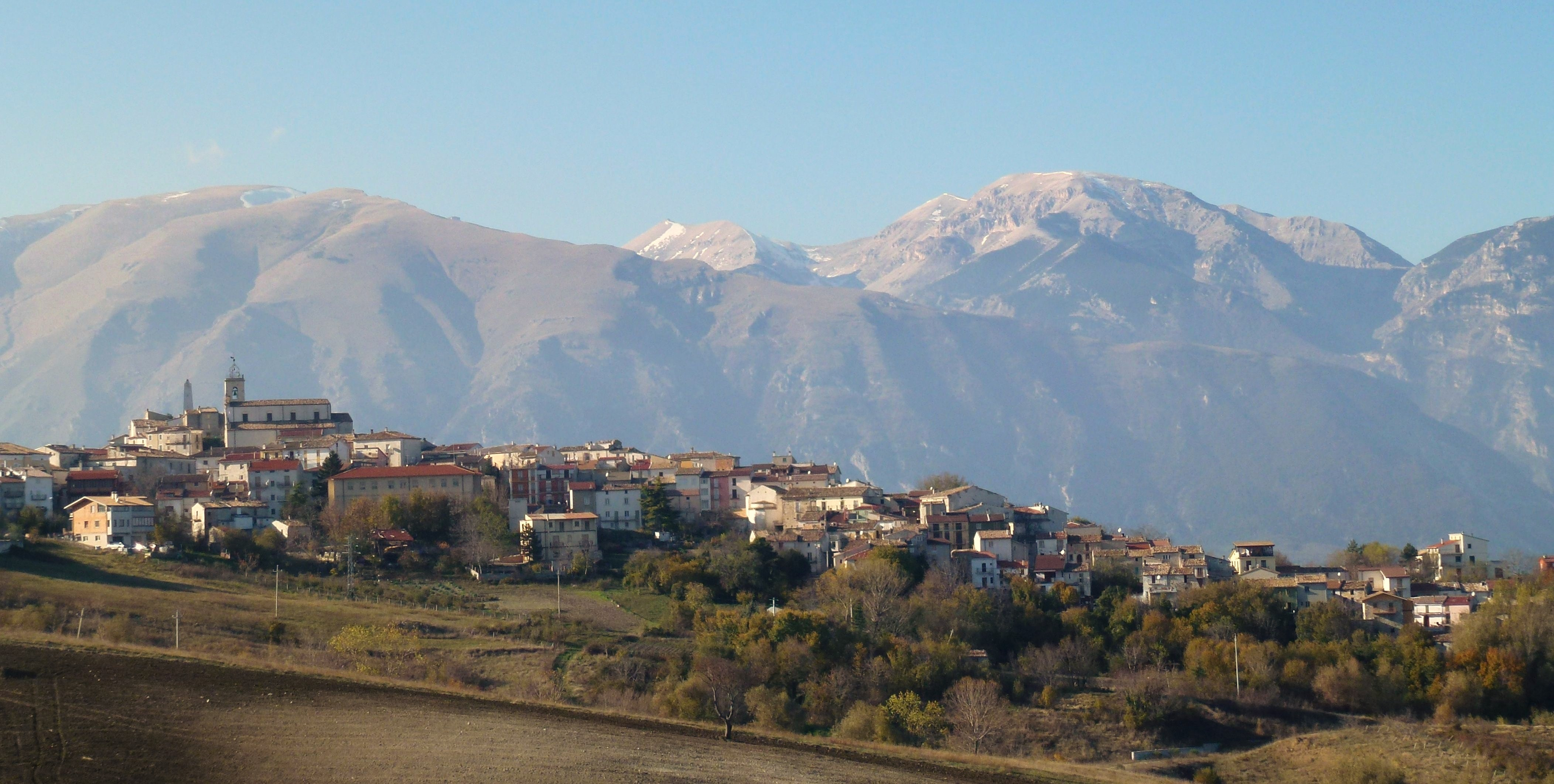 Torricella Peligna in autunno davanti alla Maiella